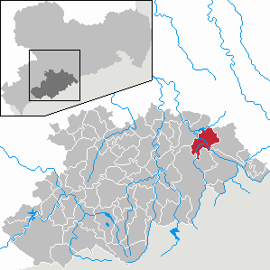 Pockau im Erzgebirgskreis, Sachsen